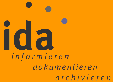 Logo der i.d.a.